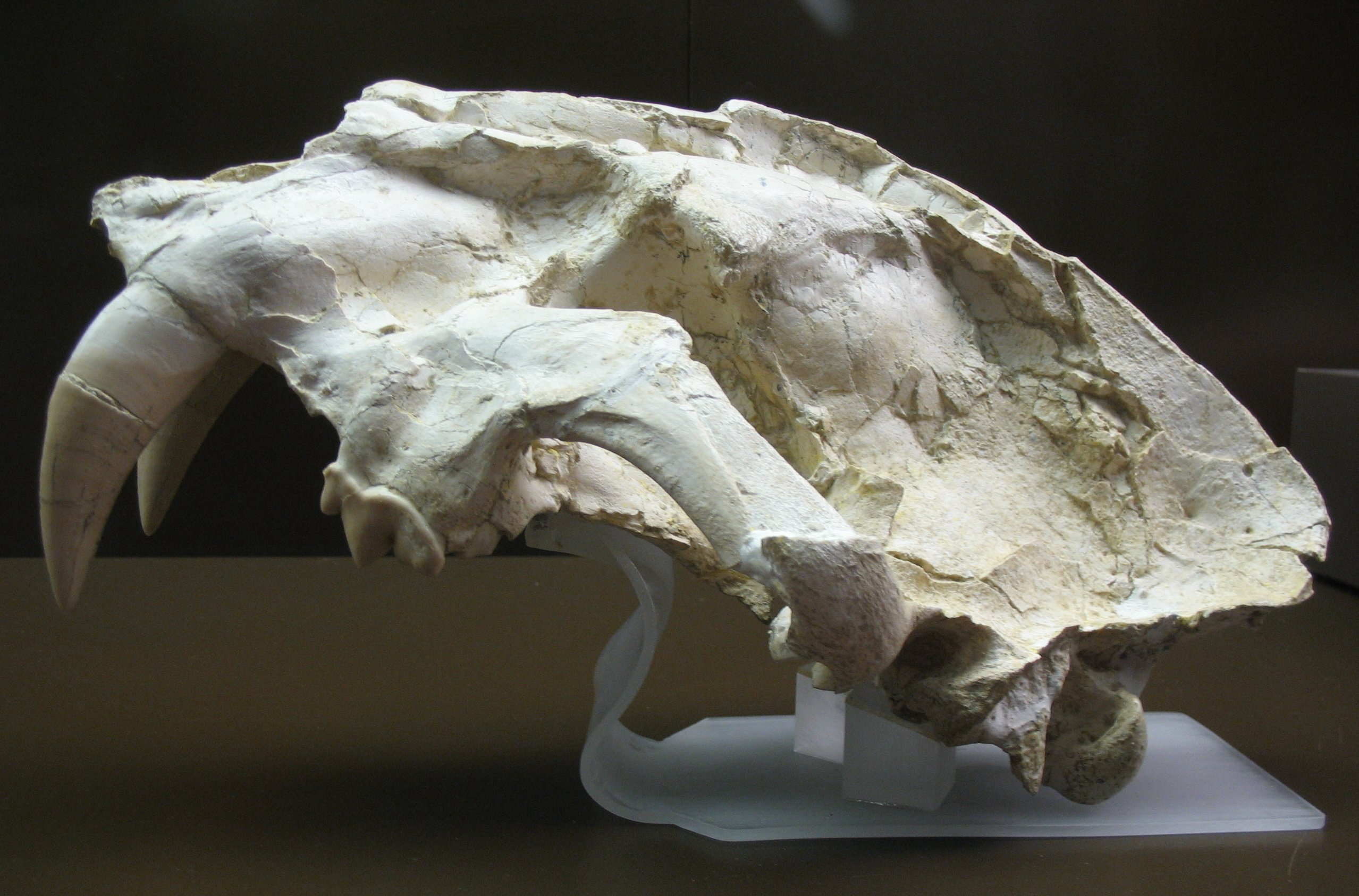 Cráneo de Machairodus aphanistus. Cerro de los Batallones (Torrejón de Velasco, Madrid, España), del Vallesiense (Mioceno superior). Ejemplar en el Museo Arqueológico Regional de la Comunidad de Madrid (Alcalá de Henares)